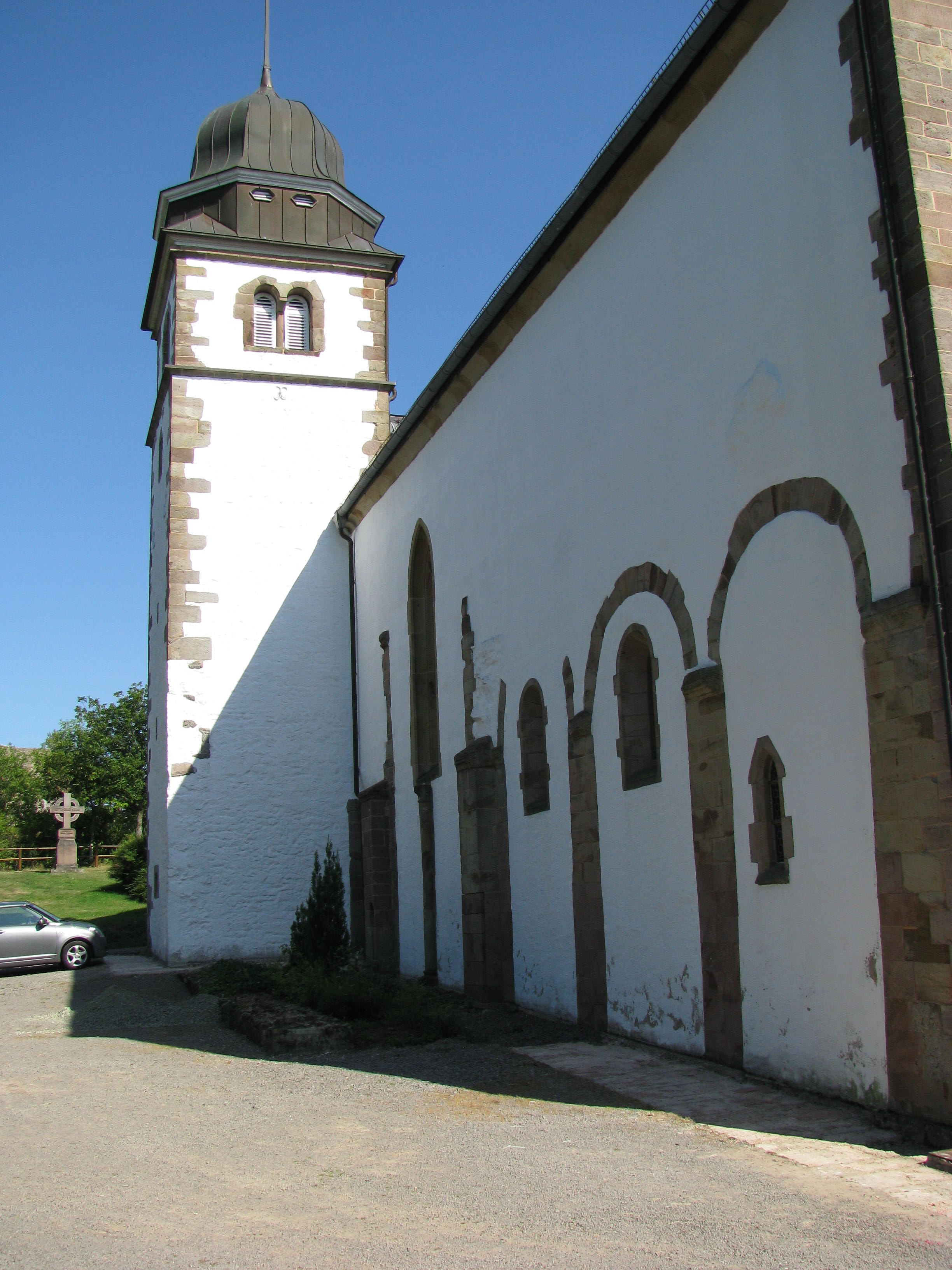 Probsteikirche St. Remigius, Remigiousberg, Nordwand mit Turm